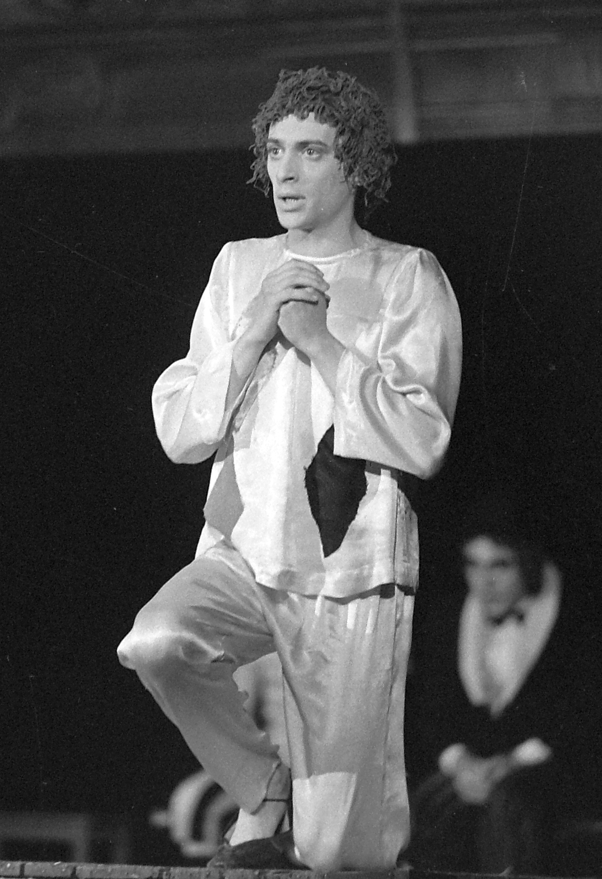 Jordán Tamás az Egyetemi Színpadon. Capek: A végzetes szerelem játéka (Universitas)